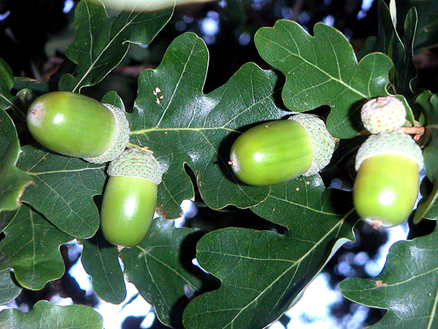 Quercus robur, Ekollon